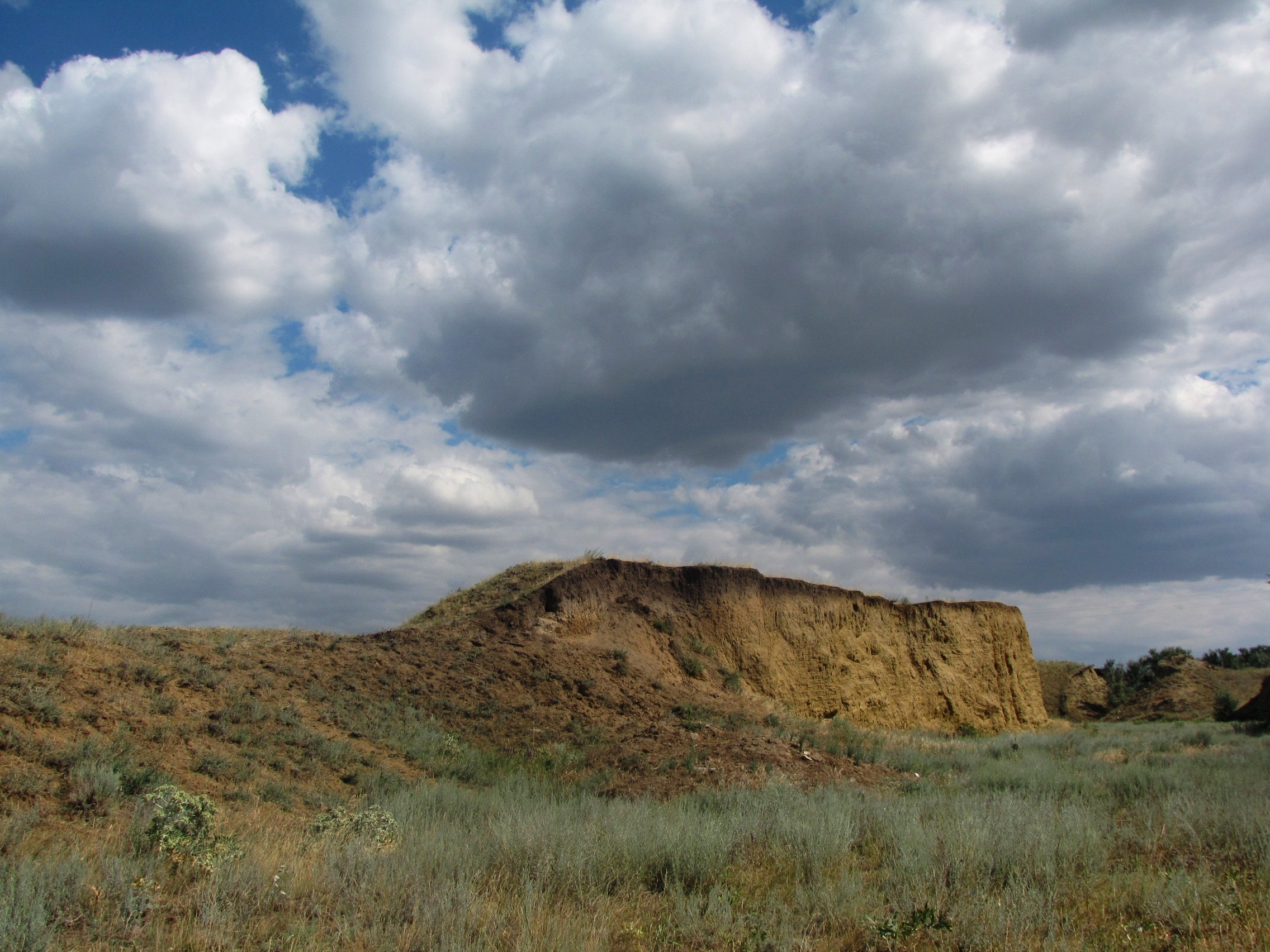 Степь вблизи станицы Сиротинской